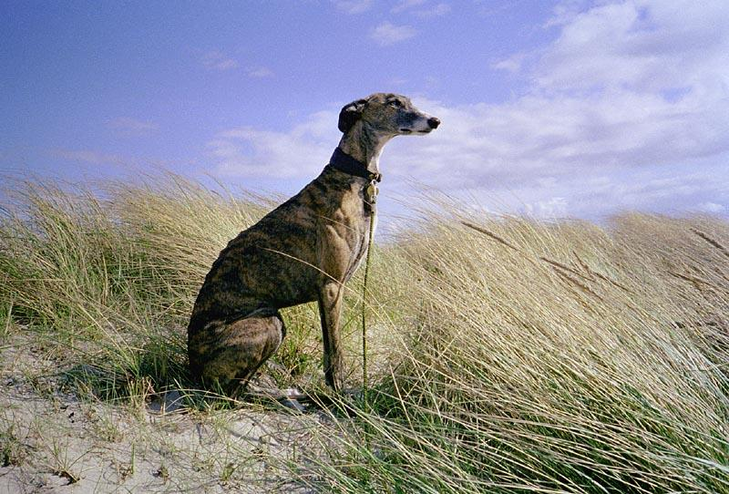 Galgo Español en los campos castellanos